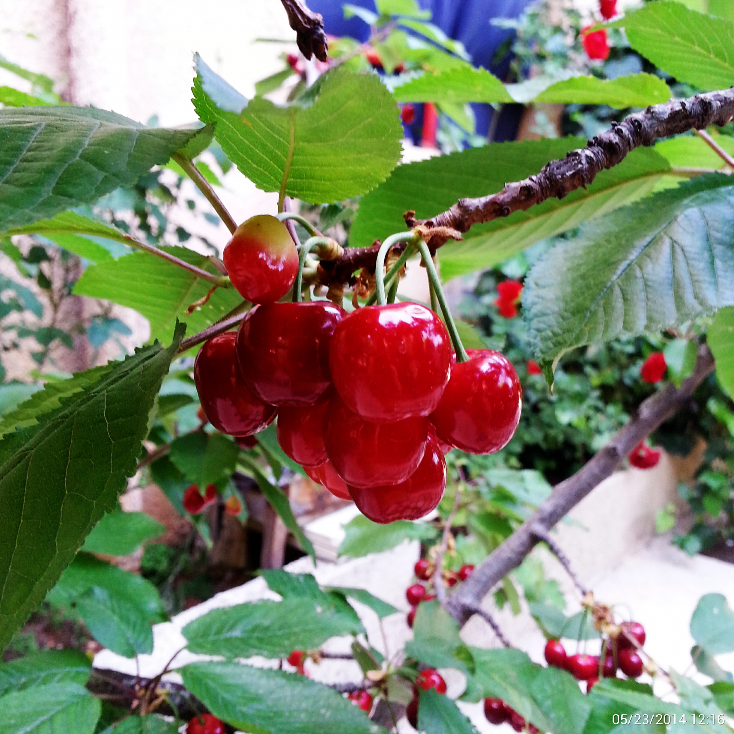 ثمار شجر الكرز وتشتهر بها بلدة بلودان الجبلية في ريف دمشق